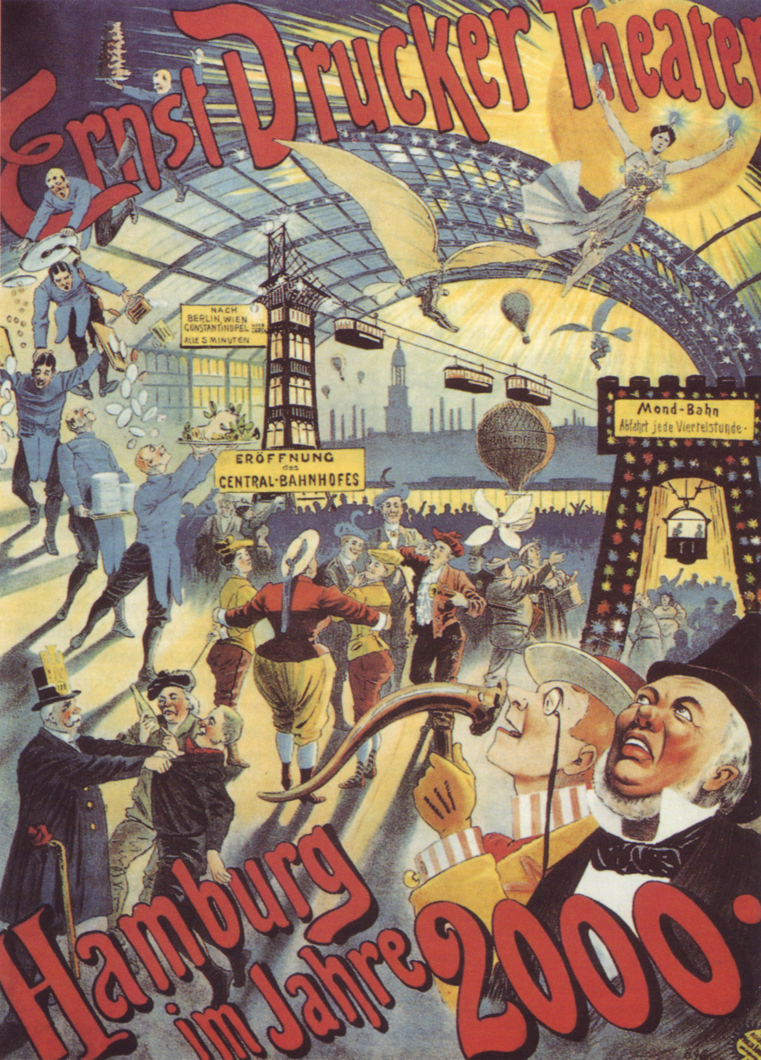 Plakat zur Revue "Hamburg im Jahre 2000", 1896.